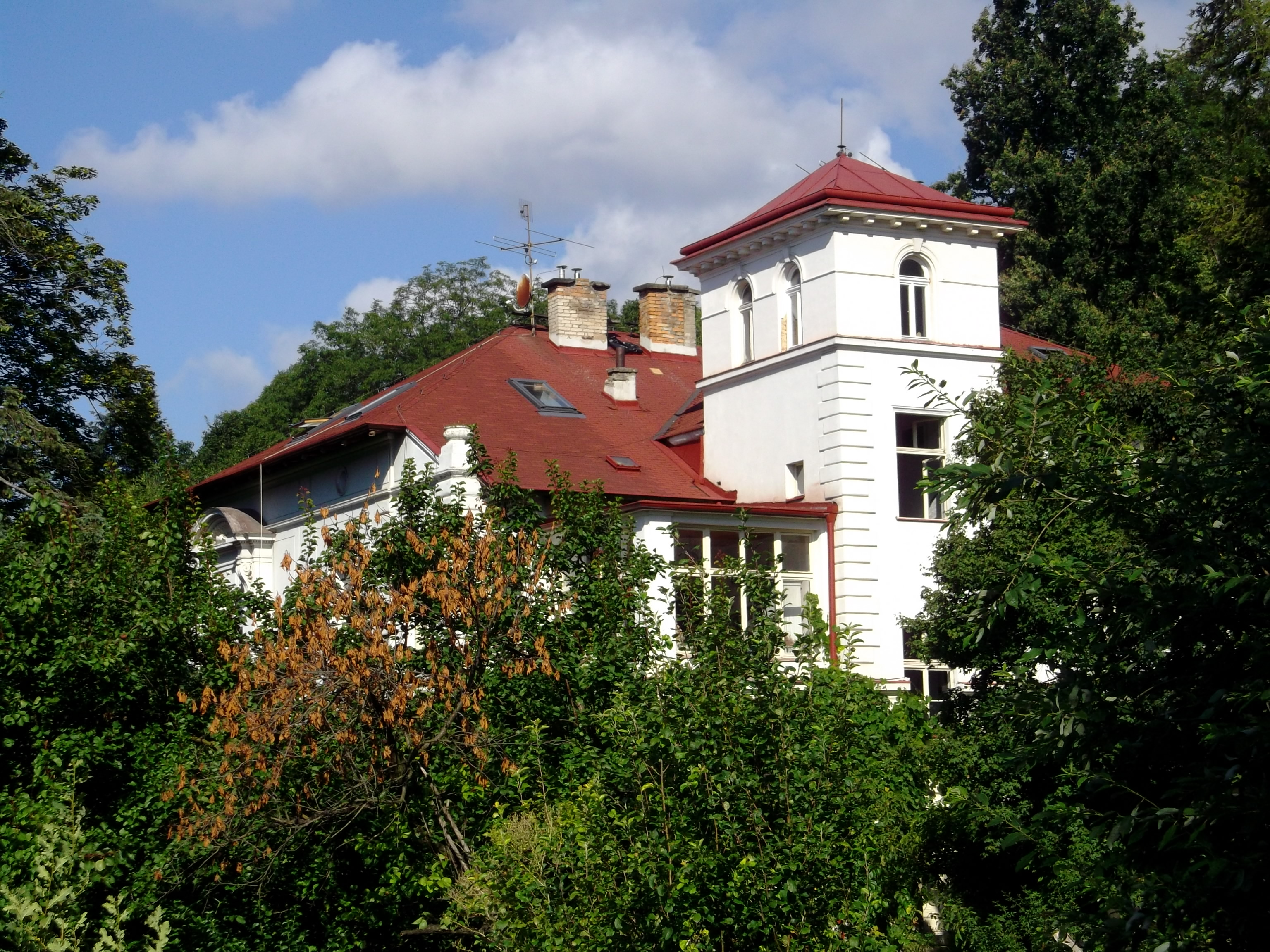 Stibralova vila, Praha 4-Michle, U Plynárny 311/73